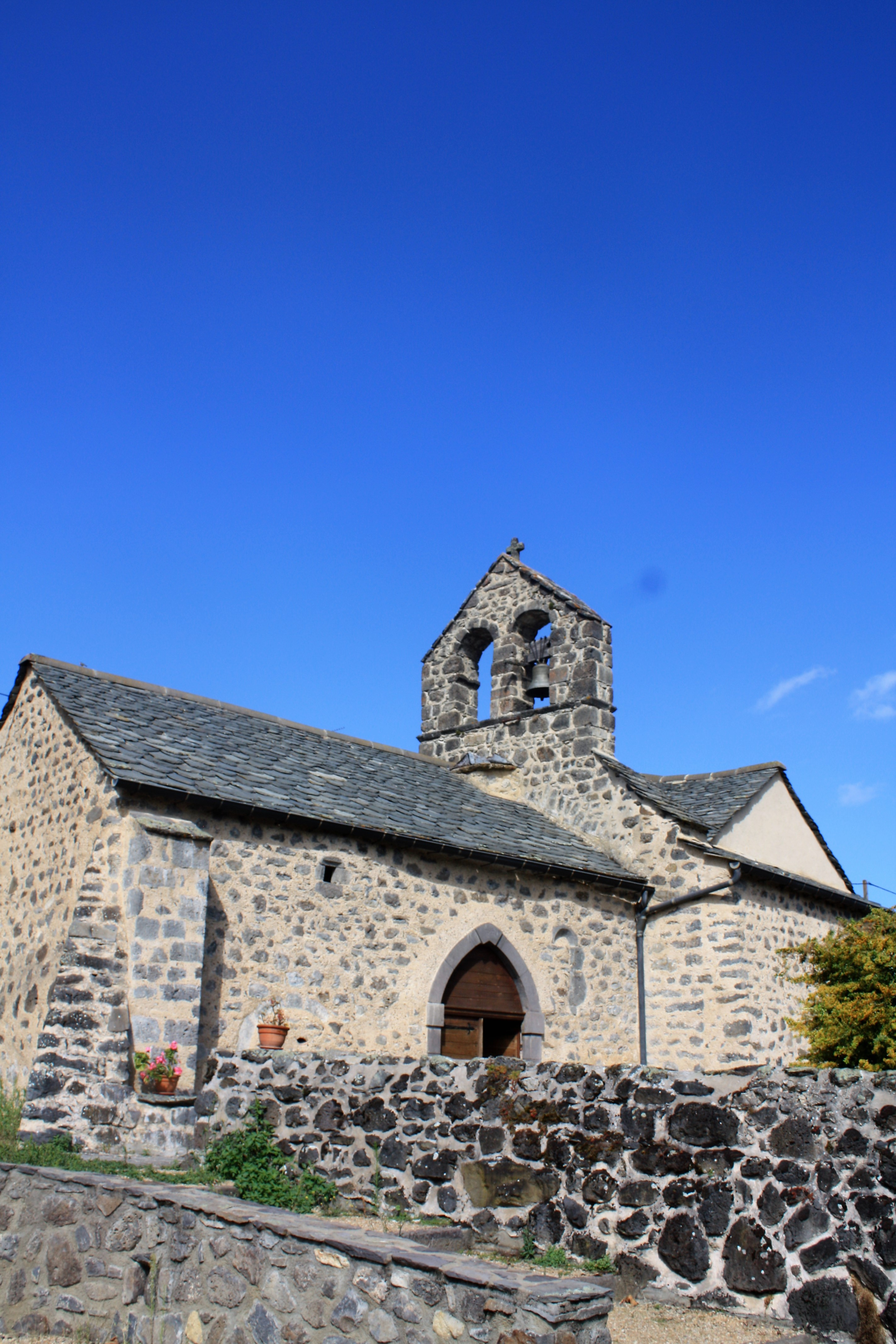 Église Sainte-Marguerite de Ternant-les-Eaux .